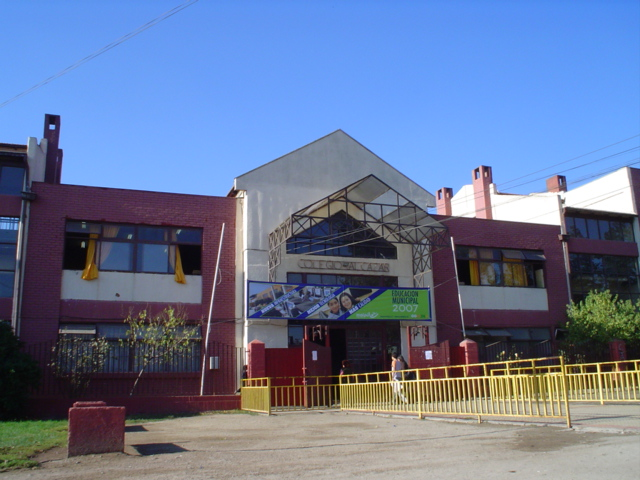 Colegio Alcazar